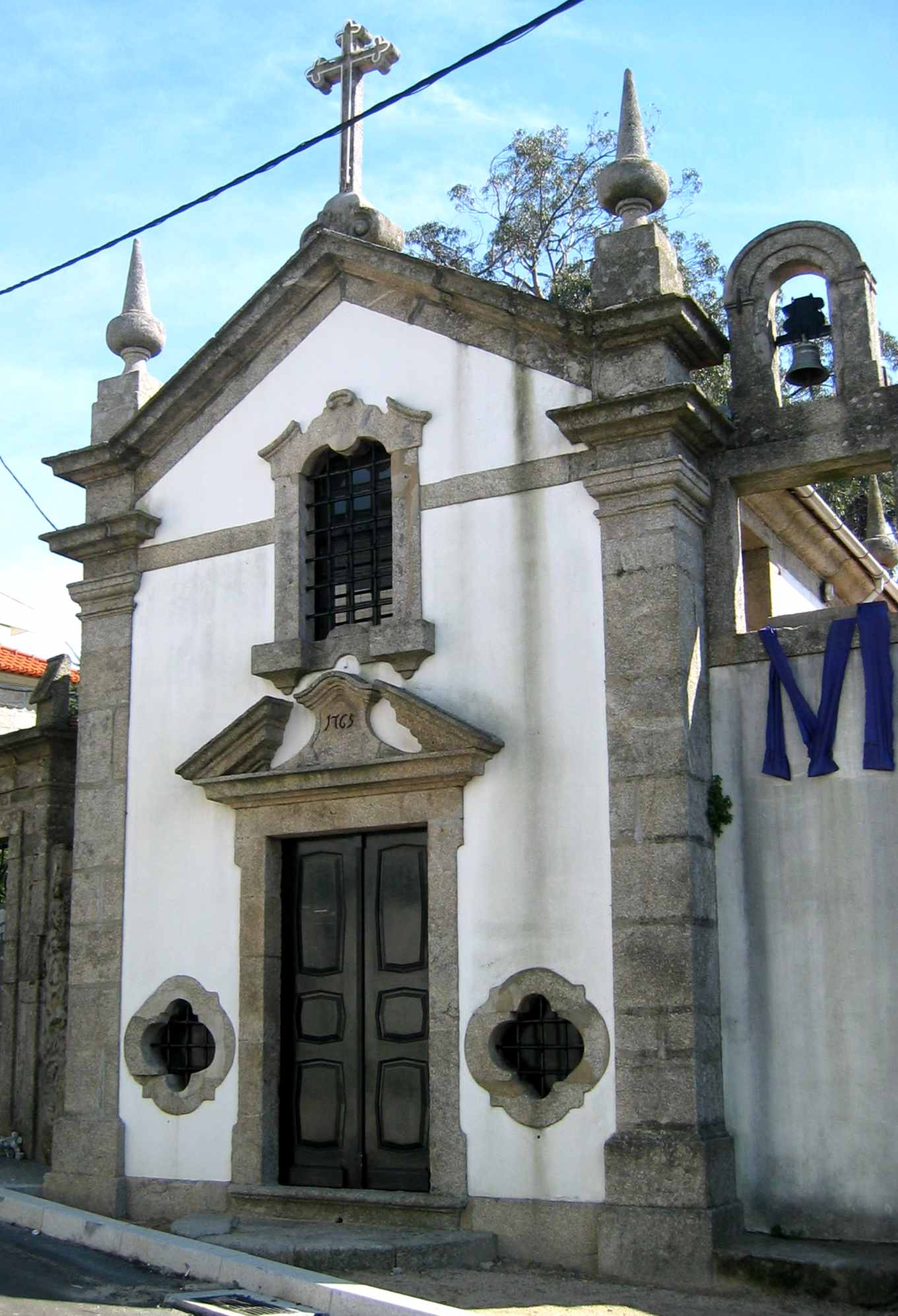 Quinta da Campaínha - Rio Tinto - Portugal